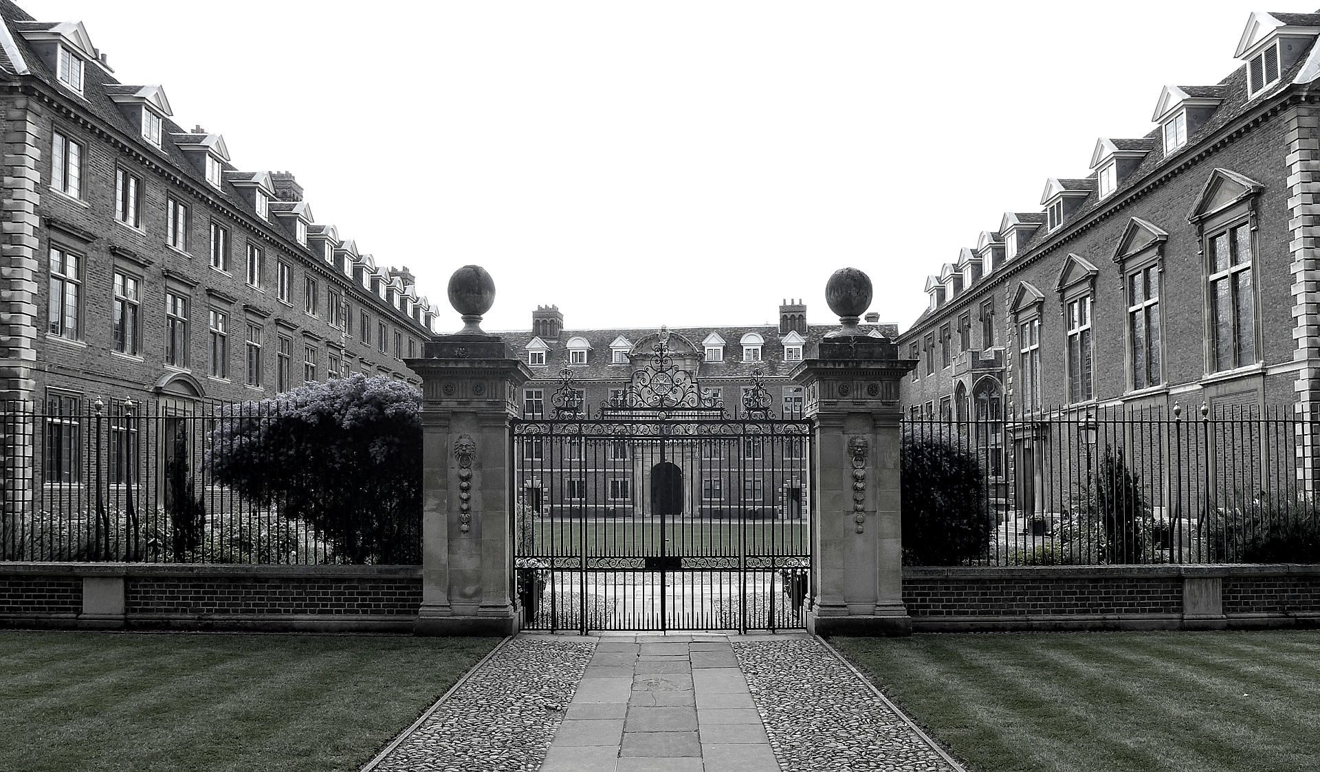 Blick von der Trumpington Street auf St Catharine's College mit Haupttor. Grade I listed building in Cambridge. Aufnahme 05-2014.